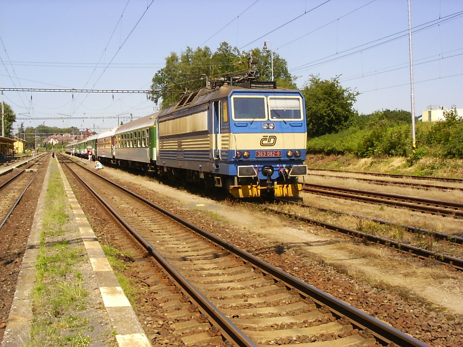 Long distance train at Františkovy Lázně station